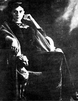 La poétesse italienne Amalia Guglielminetti (1881- 1941).